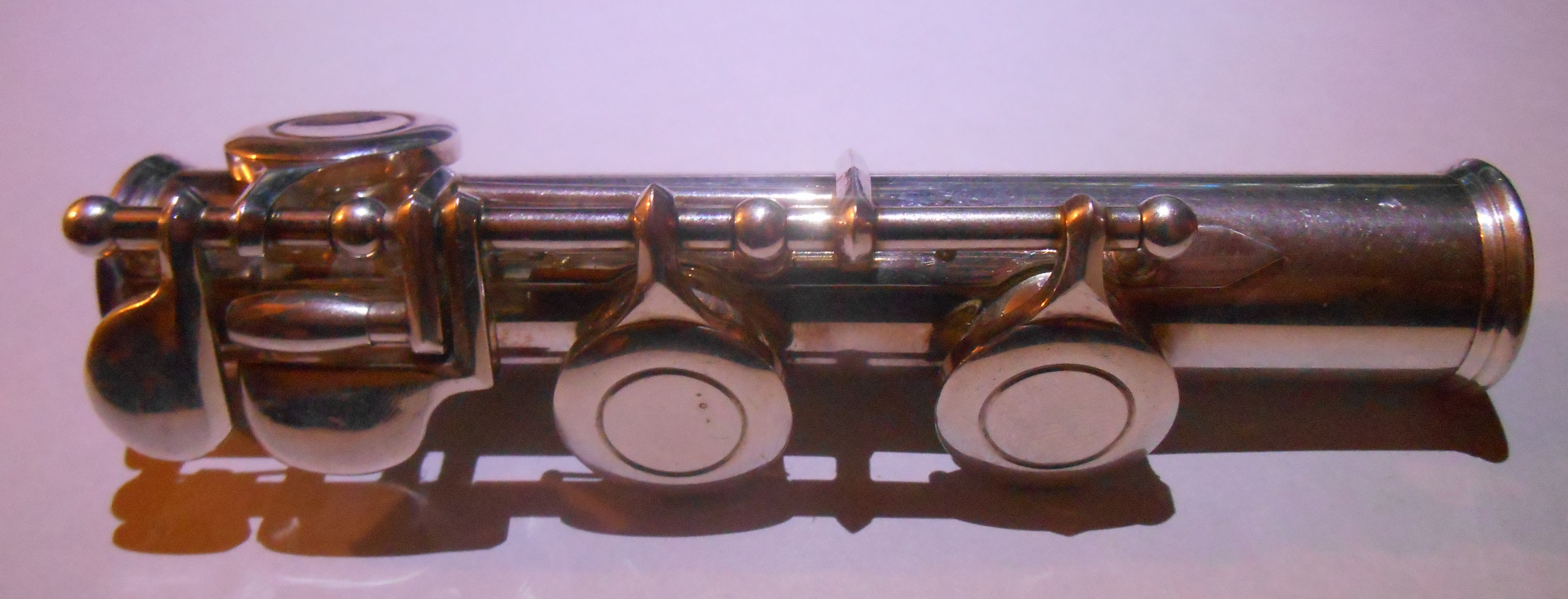 Колено "До" поперечной флейты